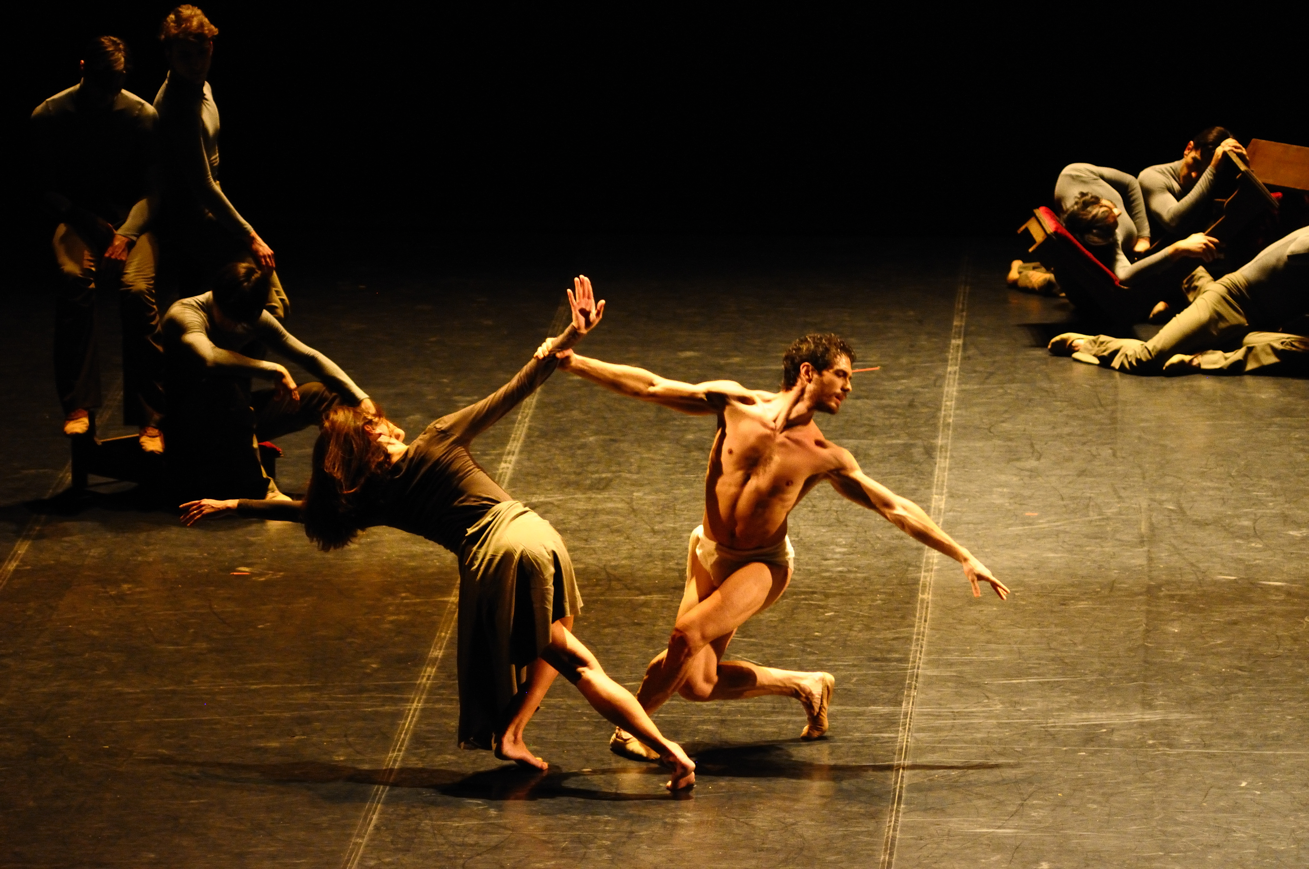 Stabat Mater, coreografia Francesco Ventriglia, MaggioDanza (2011)